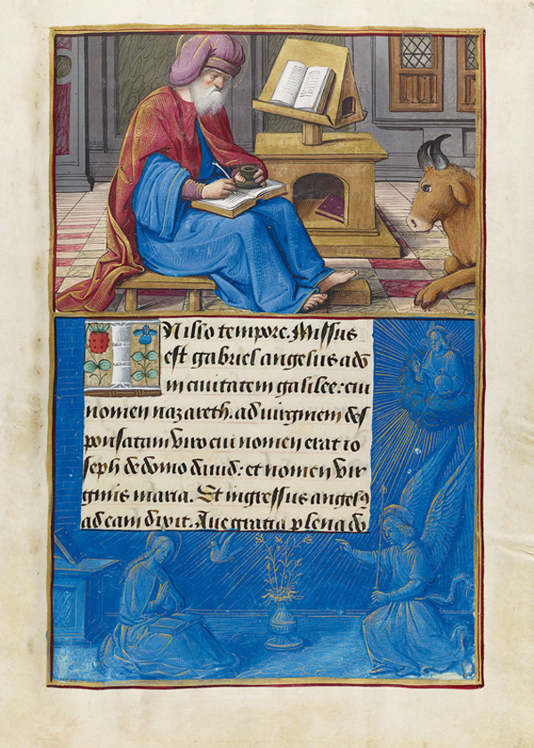 enrique VIII